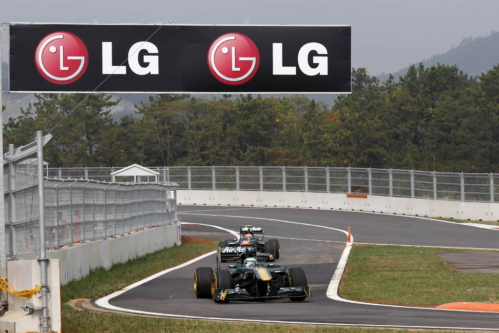 LG전자가 14일 ~ 16일 전남 영암에서 열린 '2011 F1™ 코리아그랑프리'에서 글로벌 브랜드로서의 위용을 뽐내며 전세계 F1™ 팬들의 눈길을 사로잡았다. 사진은 서킷(경주로)을 달리는 F1™ 경주용 자동차들. ※ LG전자 뉴스룸 에서 관련 보도자료를 확인실 수 있습니다.